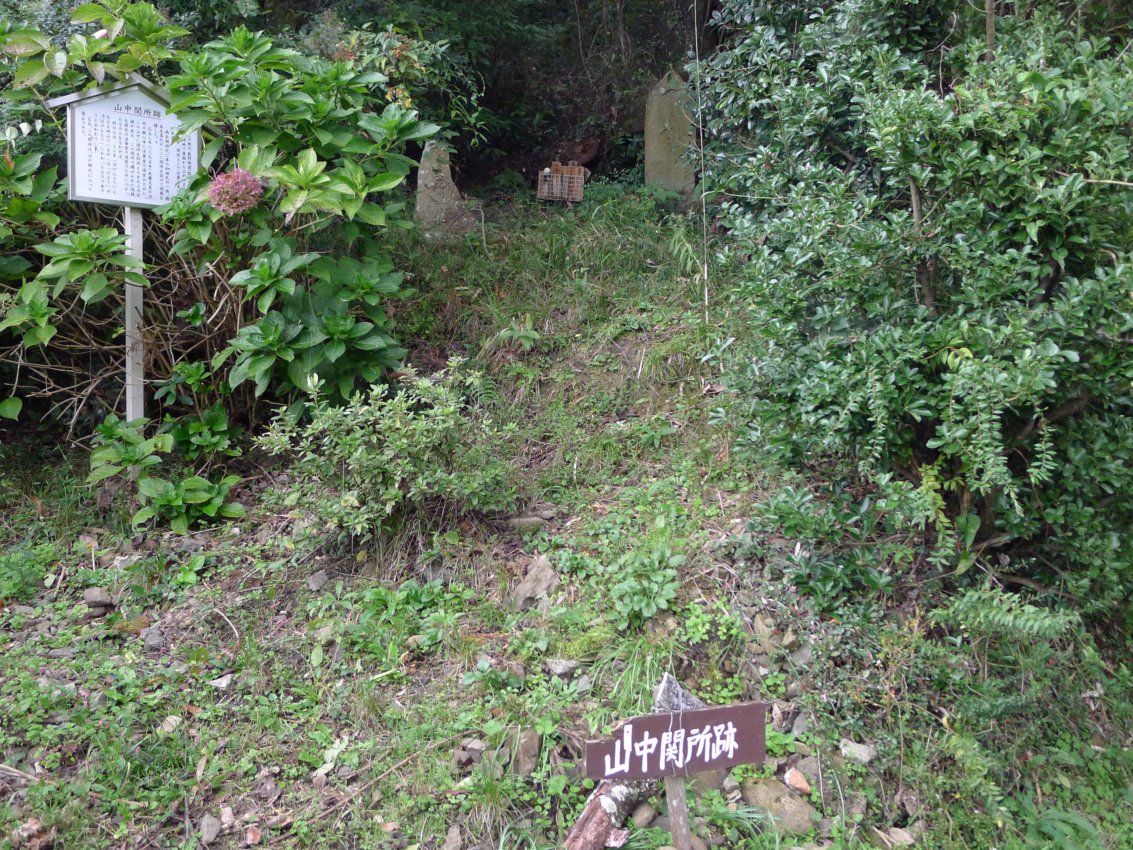 熊野古道紀伊路・紀州街道における和泉国と紀伊国の国境近くあった山中関所跡。JR阪和線の山中渓駅から雄ノ山峠へ向かって進んだ場所にある。